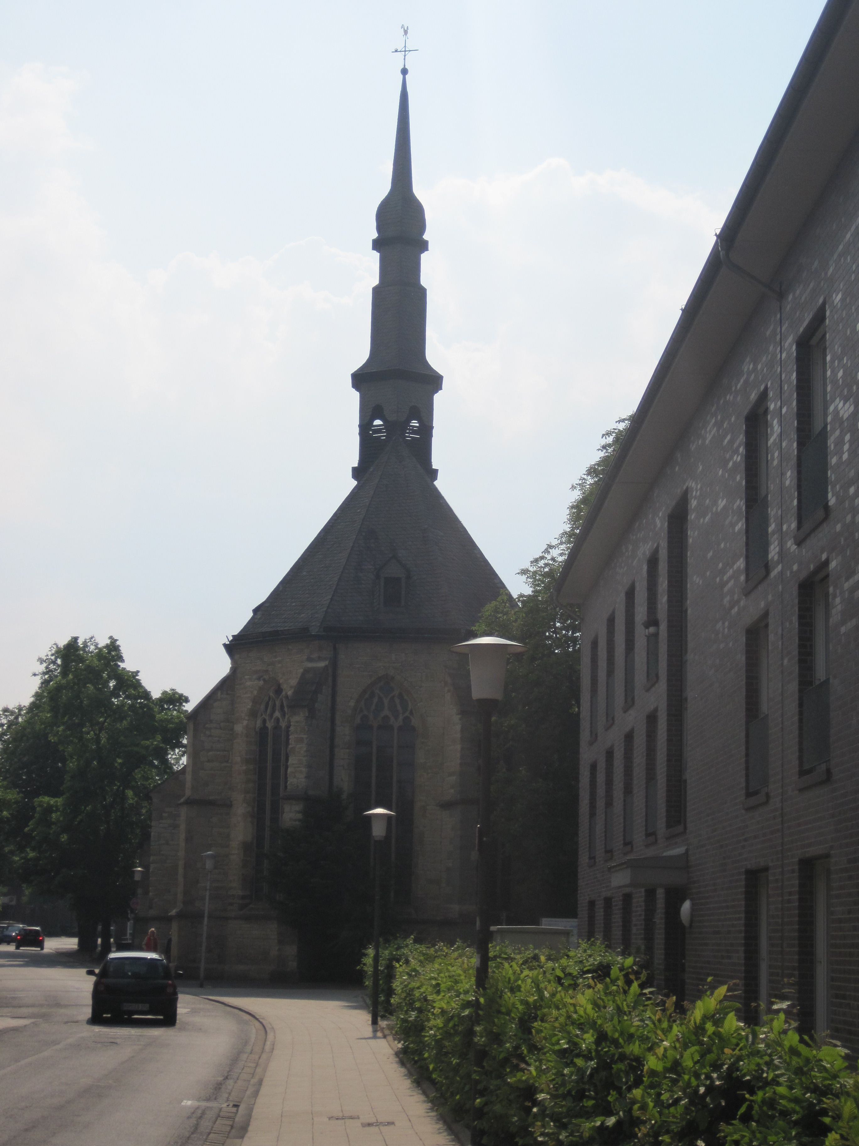 Dieses Foto zeigt die St. Agnes-Kirche in Hamm.